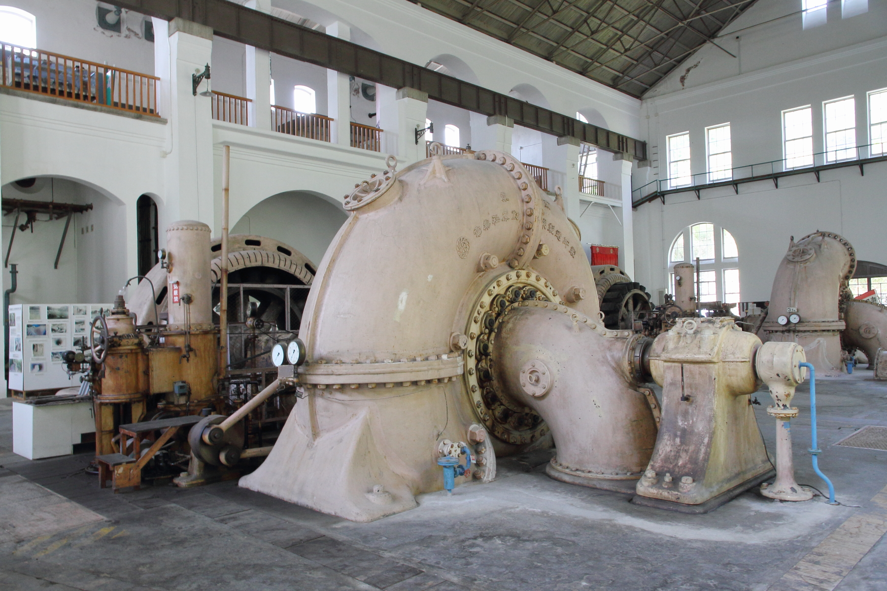 旧八百津発電所資料館に保存されているフランシス水車